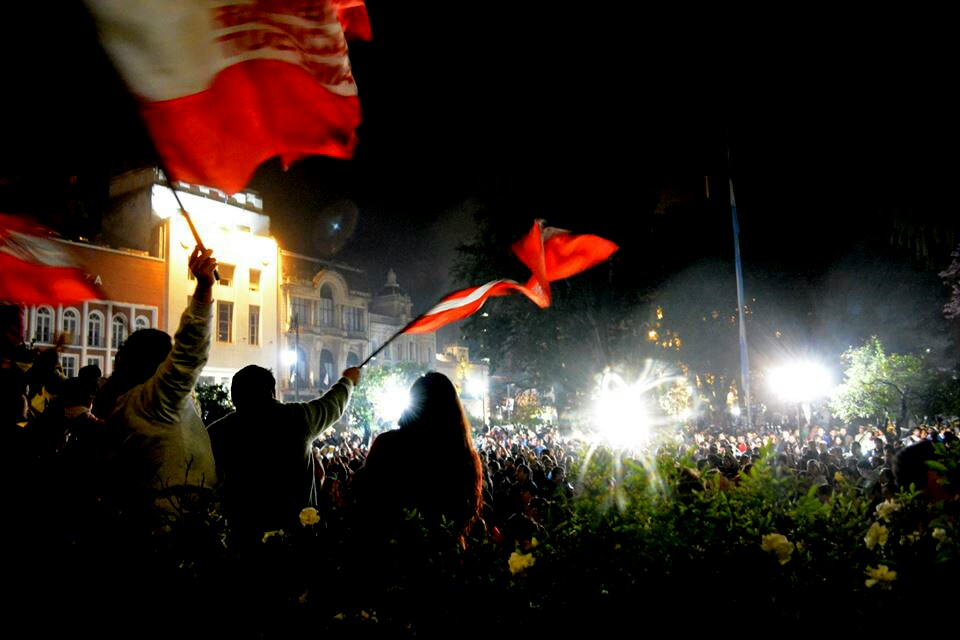 26 AGO 2015: Manifestación popular contra las presuntas irregularidades en la elección.